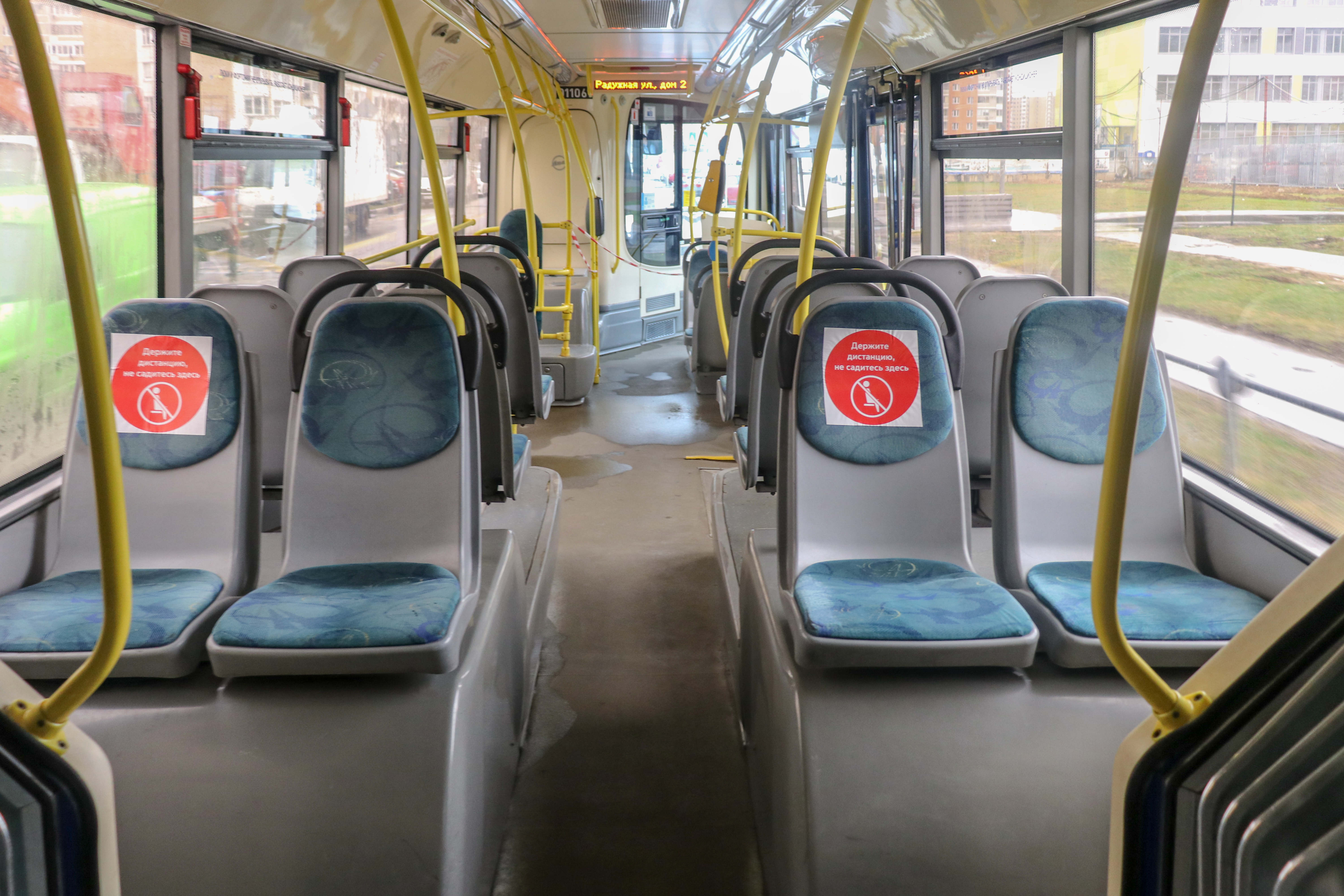 Апрель 2020, период пандемии COVID-19. Красная разметка для соблюдения горожанами дистанции в полтора — два метра в московском наземном общественном транспорте.